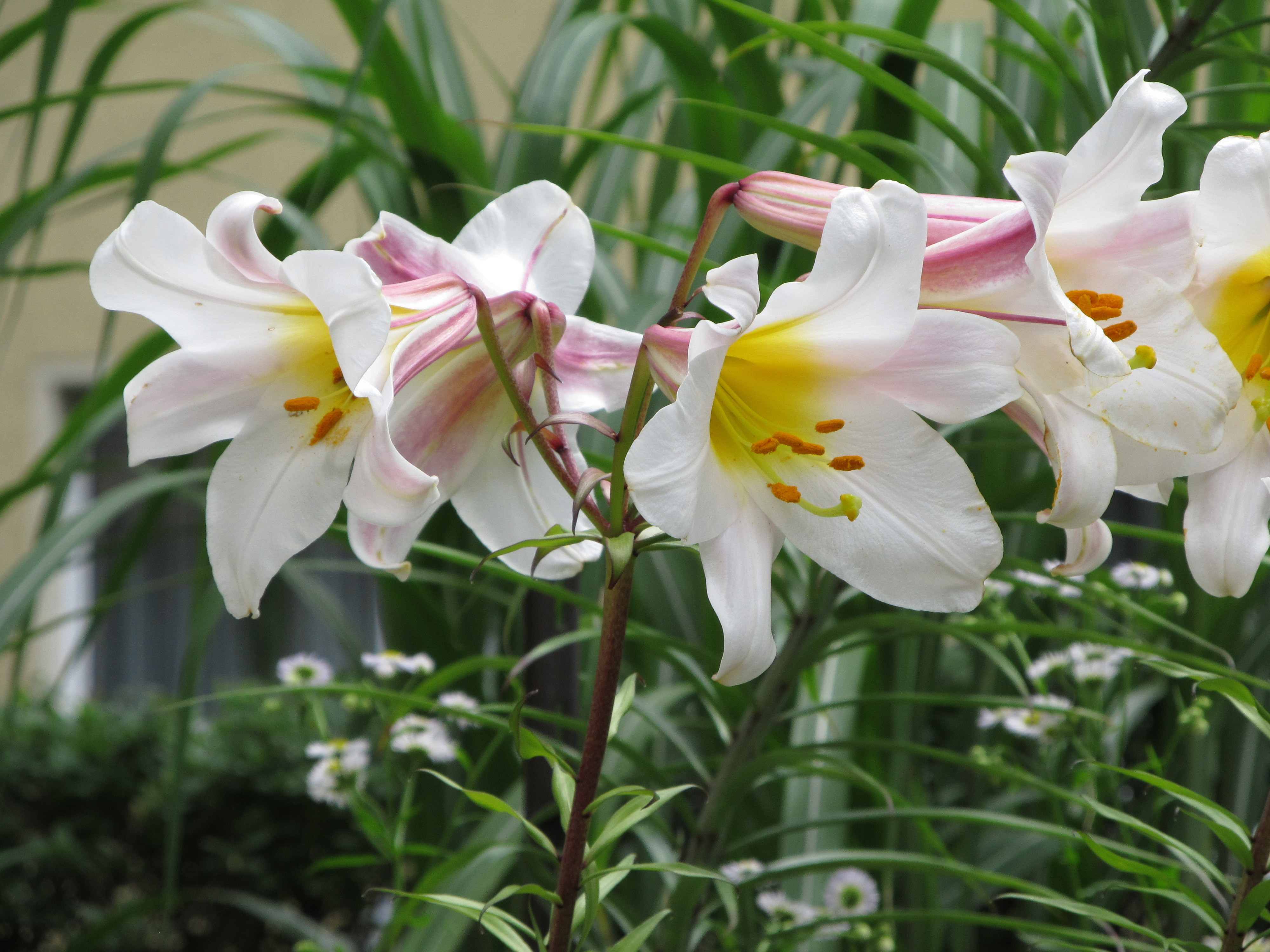 Королевская лилия